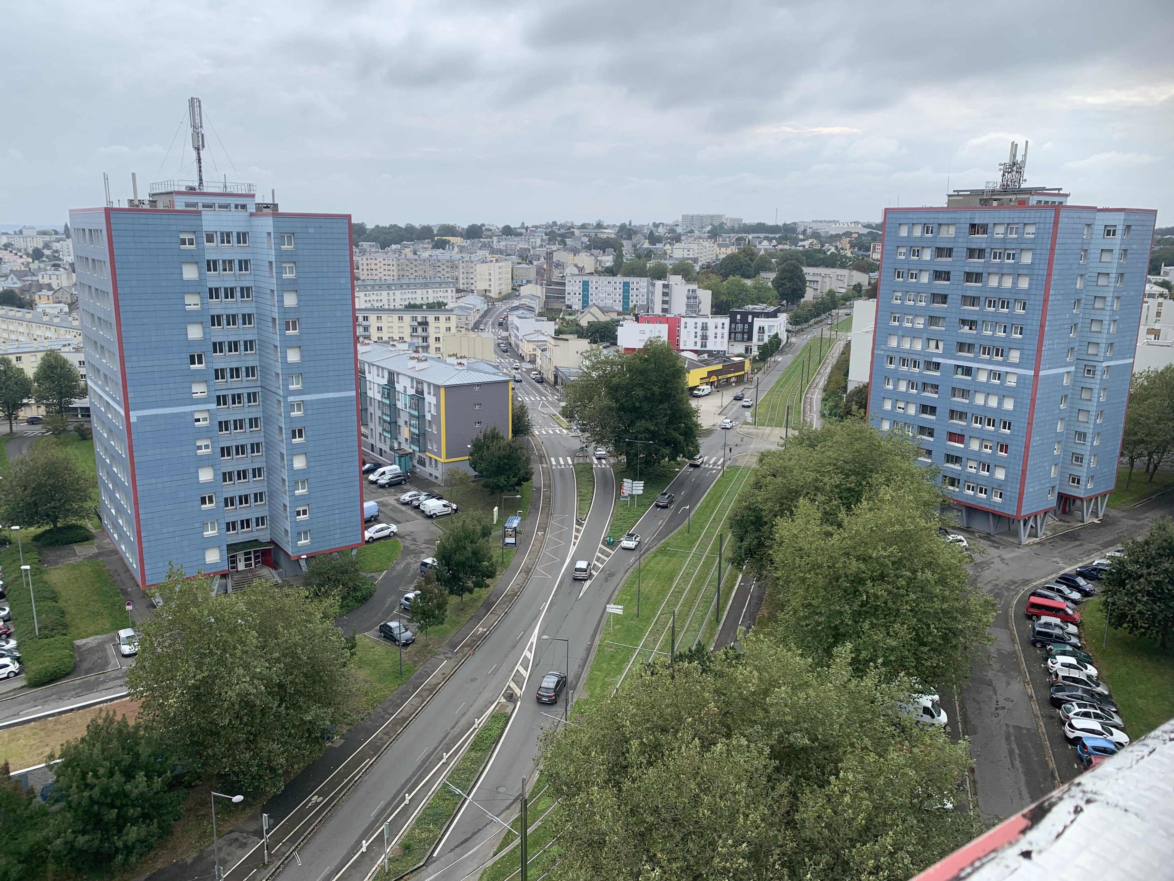 Quartier de Saint-Pierre depuis le 12ème étage de la tour de Quéliverzan